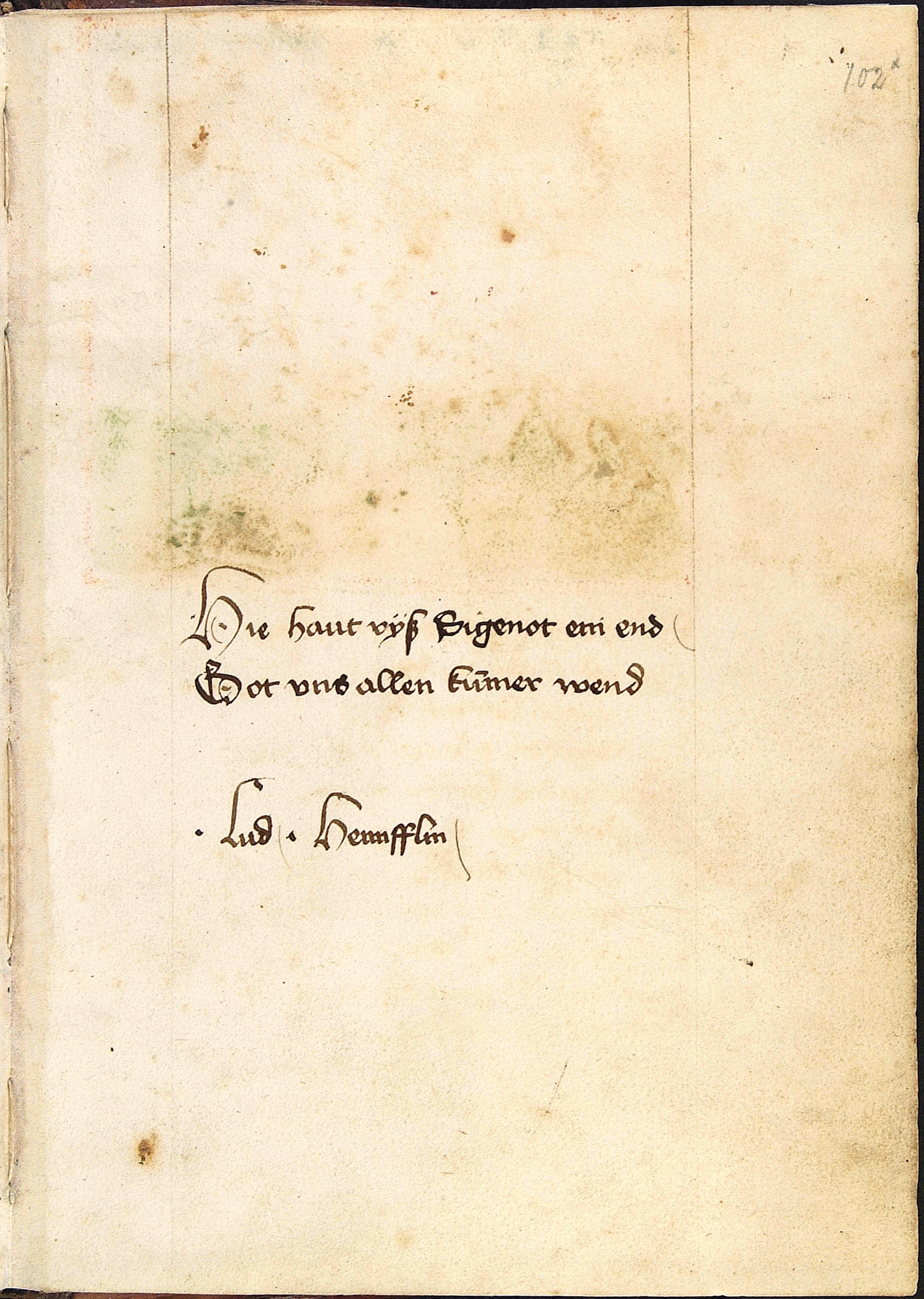 Codex Palatinus germanicus 67, Blatt 102r - Schreibereintrag (mit Selbstnennung): Hie haut ryß Sigenot ein end / Got vns allen kumer wend / .Lud. Hennfflin [Schreibereintrag Ludwig Henfflin]